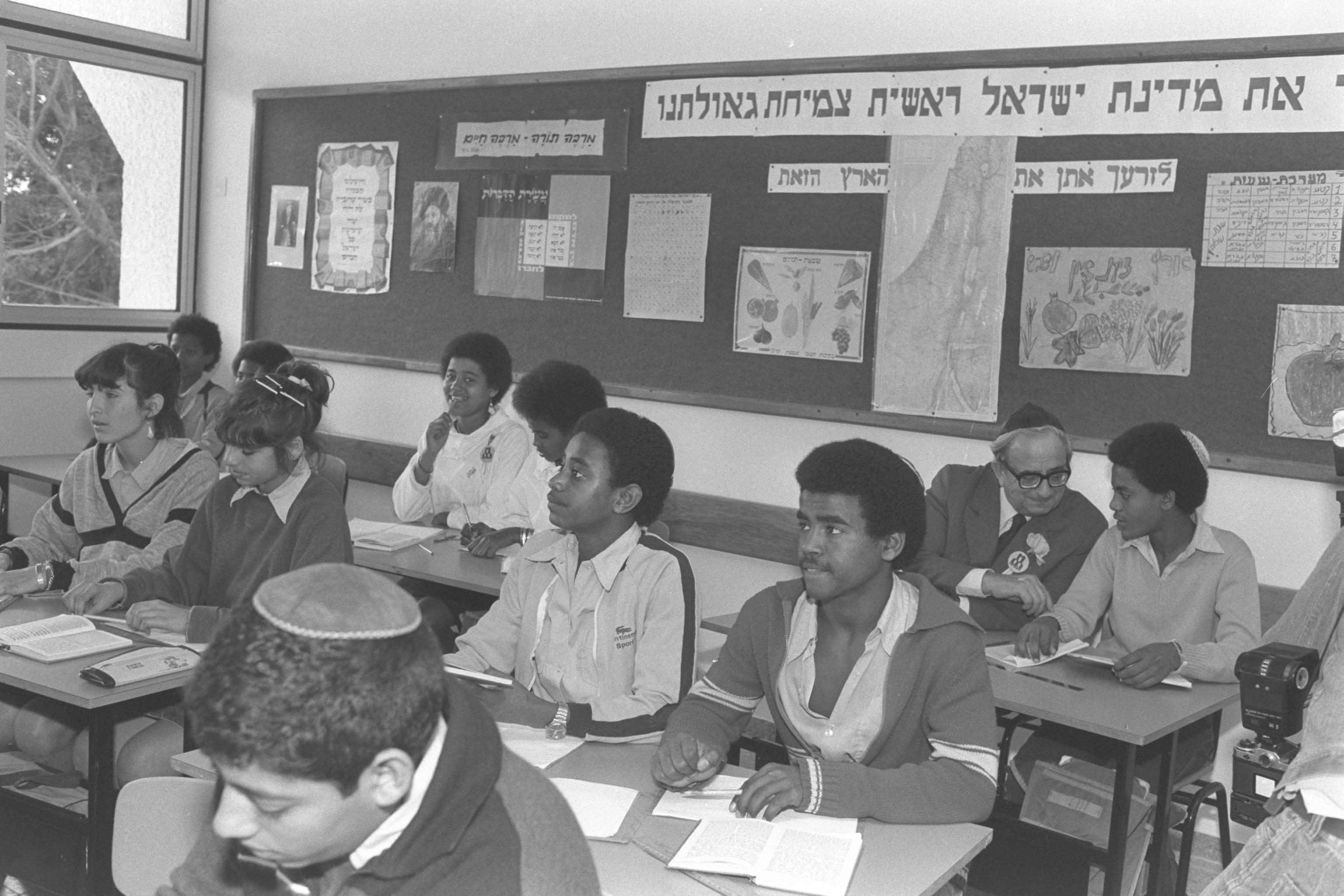 EDUCATION MIN. YITZHAK NAVON SITTING NEXT TO ETHIOPIAN PUPIL (BACK ROW RIGHT) DURING CLASS IN THE TALPIOT BOARDING SCHOOL IN HADERA. שר החינוך יצחק נבון יושב ליד תלמיד אתיופי בכיתה בבית הספר תלפיות בחדרה.